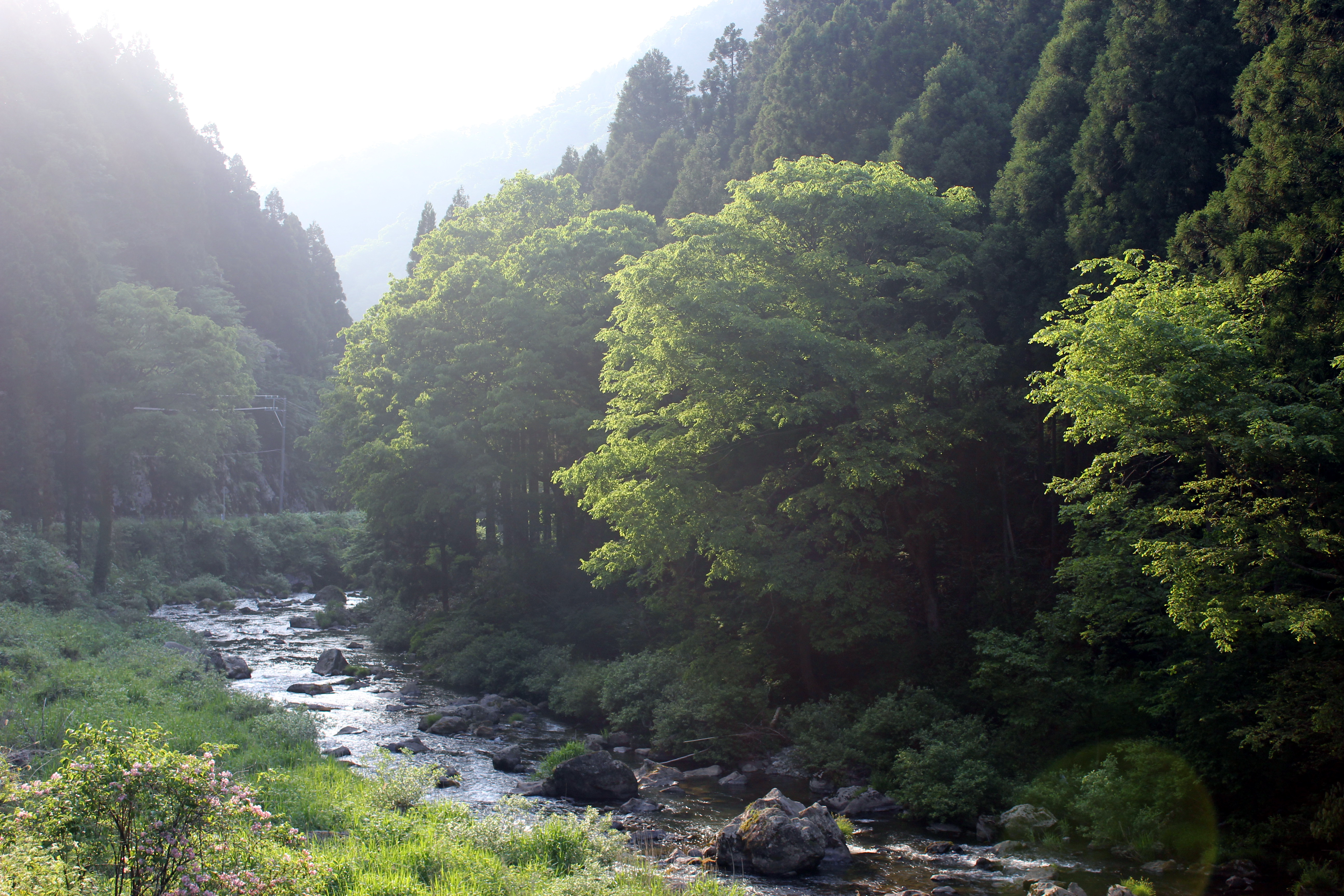 竹田川 上中流域